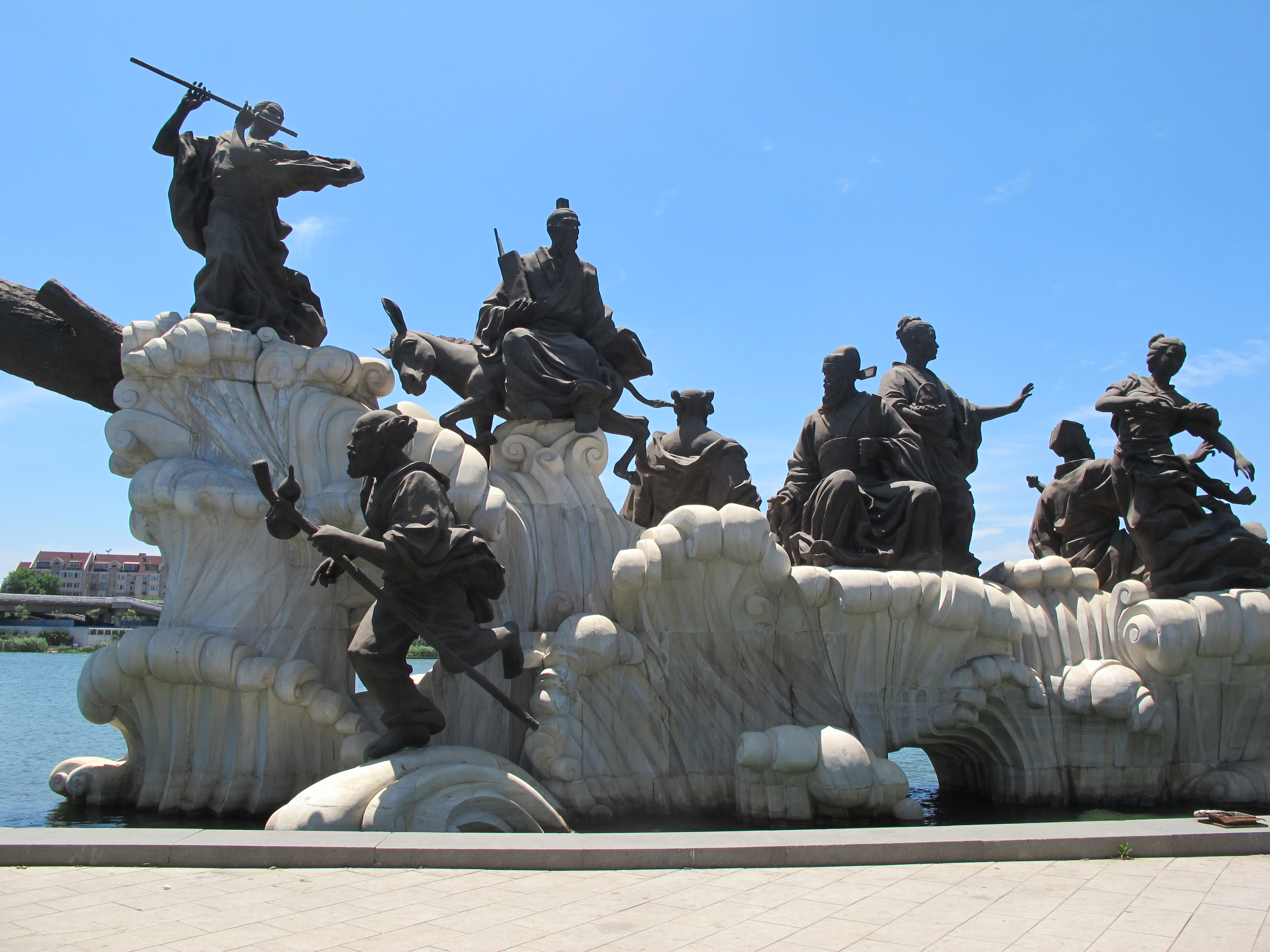 Groupe statuaire des Huit Immortels érigé en 2008 à Tianjin (Chine), bord de la Haihe, rive est, en aval du pont de Fumin.